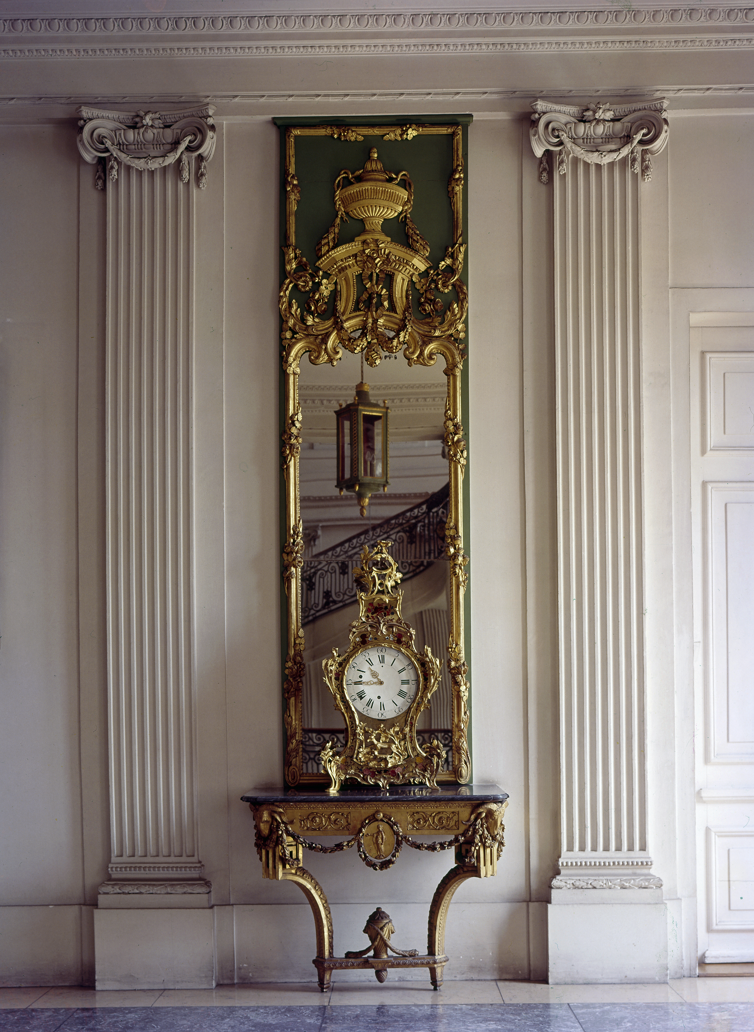 LangSwitch Error: no default